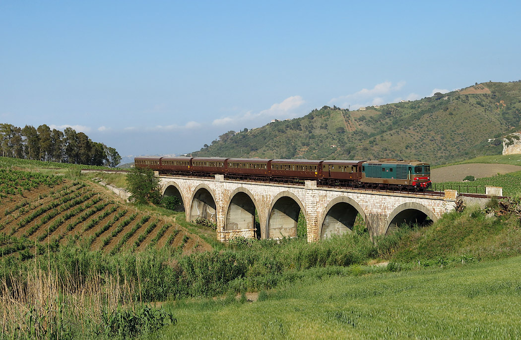 Ponte ferroviario sulla linea Palermo-Trapani (via Milo), fra la stazione di Calatafimi e la fermata di Segesta Tempio. È in transito un treno speciale Segesta-Palermo composto dalla locomotiva D.445.1034 e da carrozze "centoporte" in livrea castano-isabella.